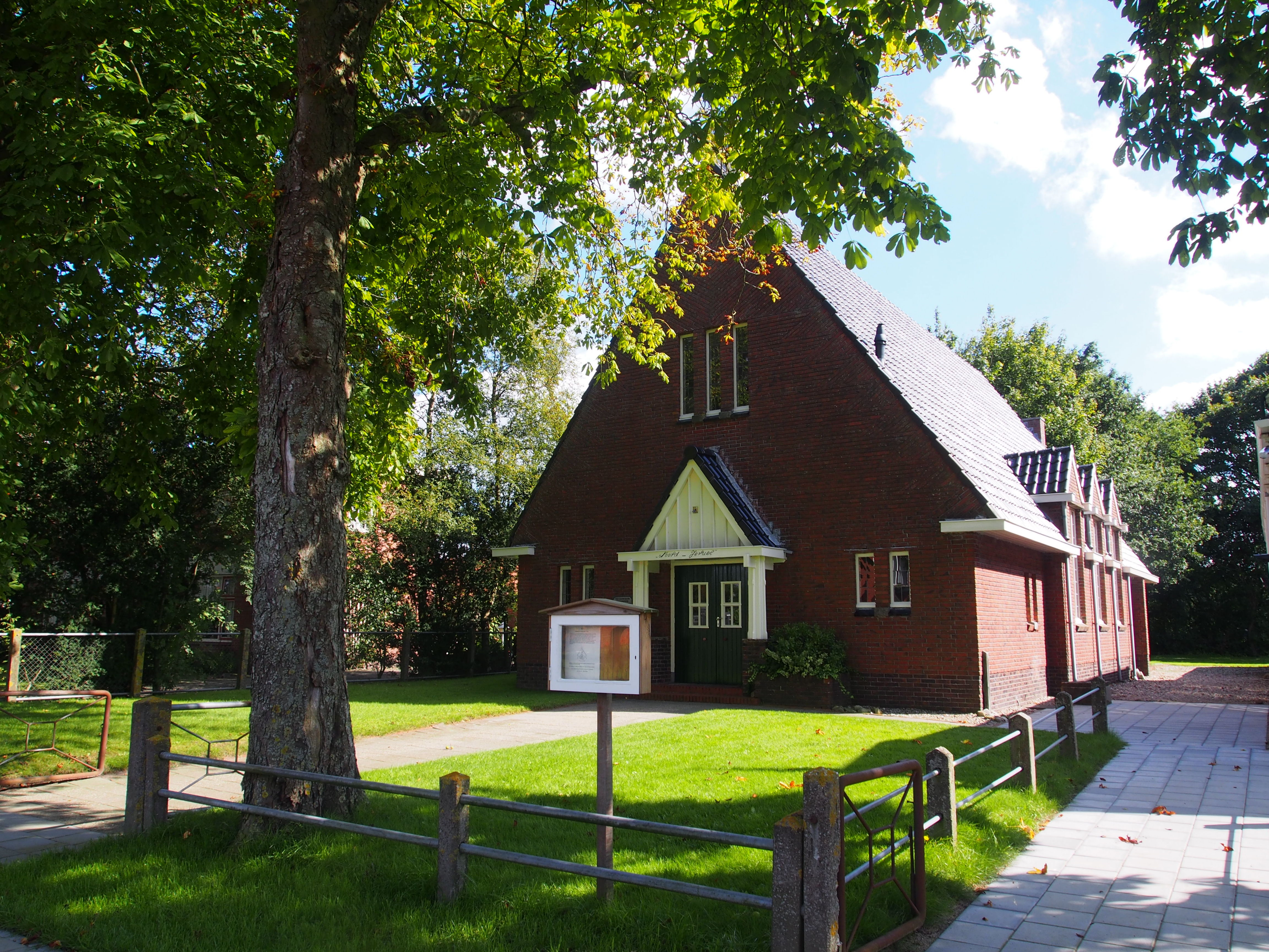 Kerk Noord Jeruël, Houtigehage